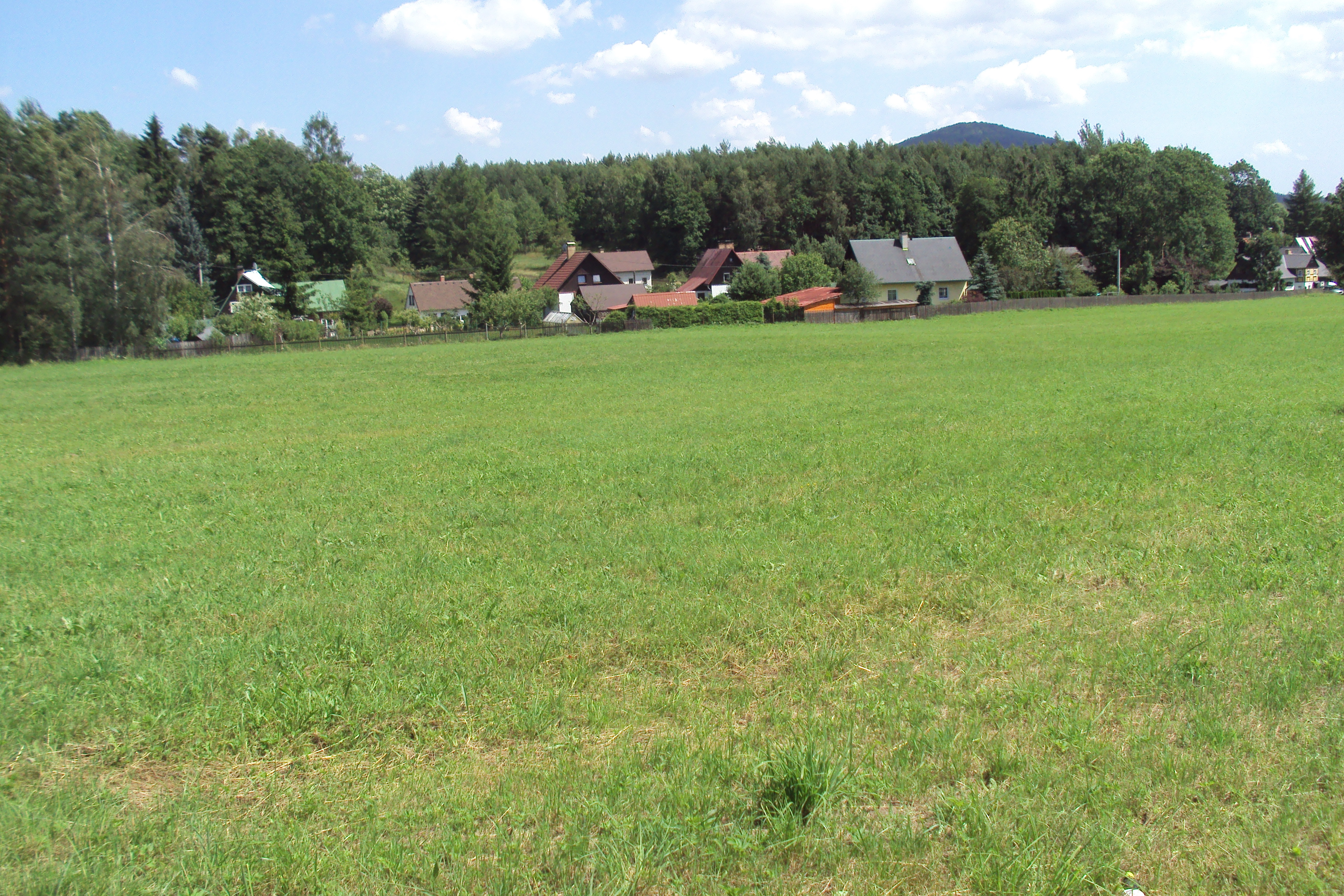 Ćást Mařenic od silnice na Světlou a Krompach